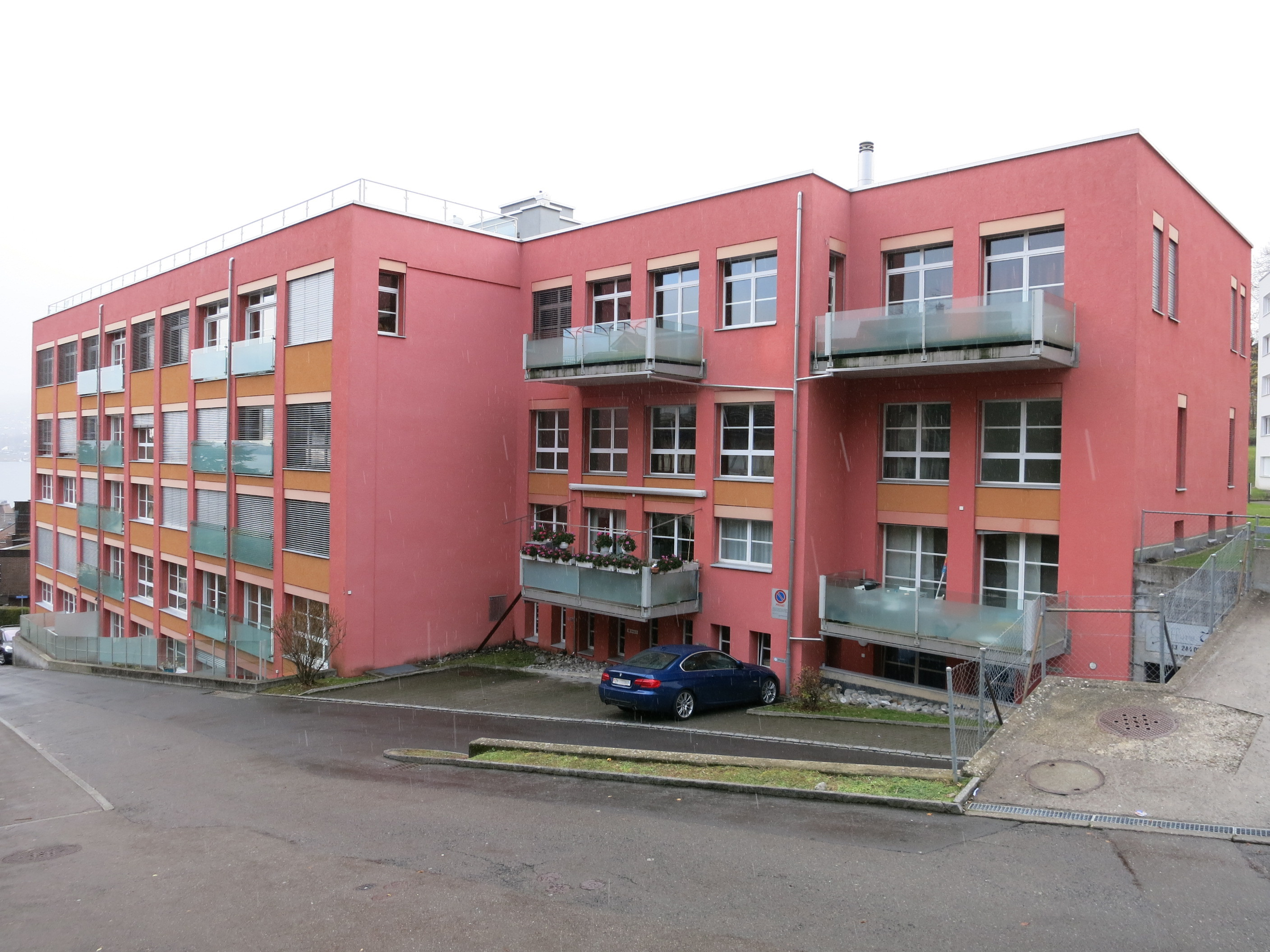 ehemalige Färberei Abegg, Horgen ZH, Schweiz